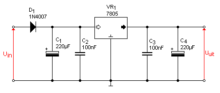 Eenvoudige 7805 Voeding.